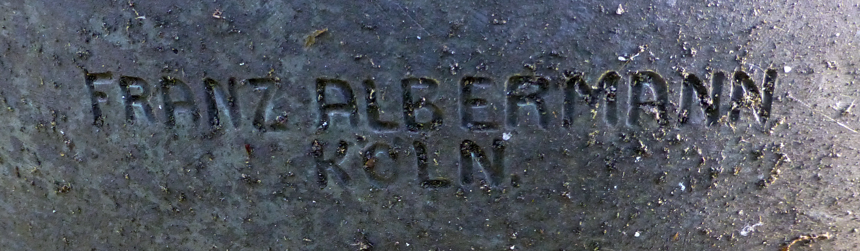 Signatur vom Künstler Franz Albermann auf dem Grabmal der Familie Ulrich auf dem Kölner Melaten-Friedhof.